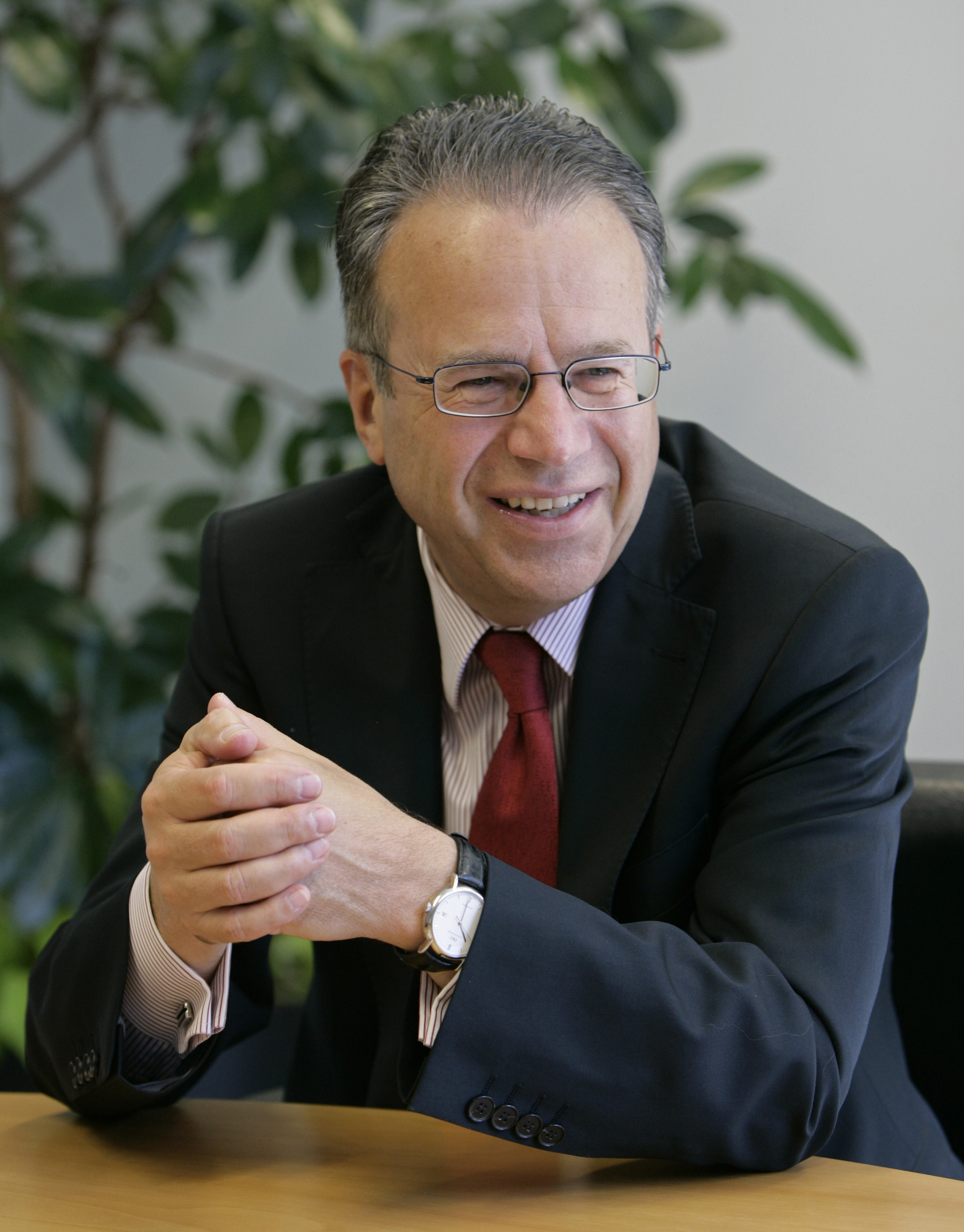 Frank-Jürgen Weise, Vorstandsvorsitzender der deutschen Bundesagentur für Arbeit und Leiter der Bundeswehr-Strukturkommission. Foto: Bundeswehr/Bienert